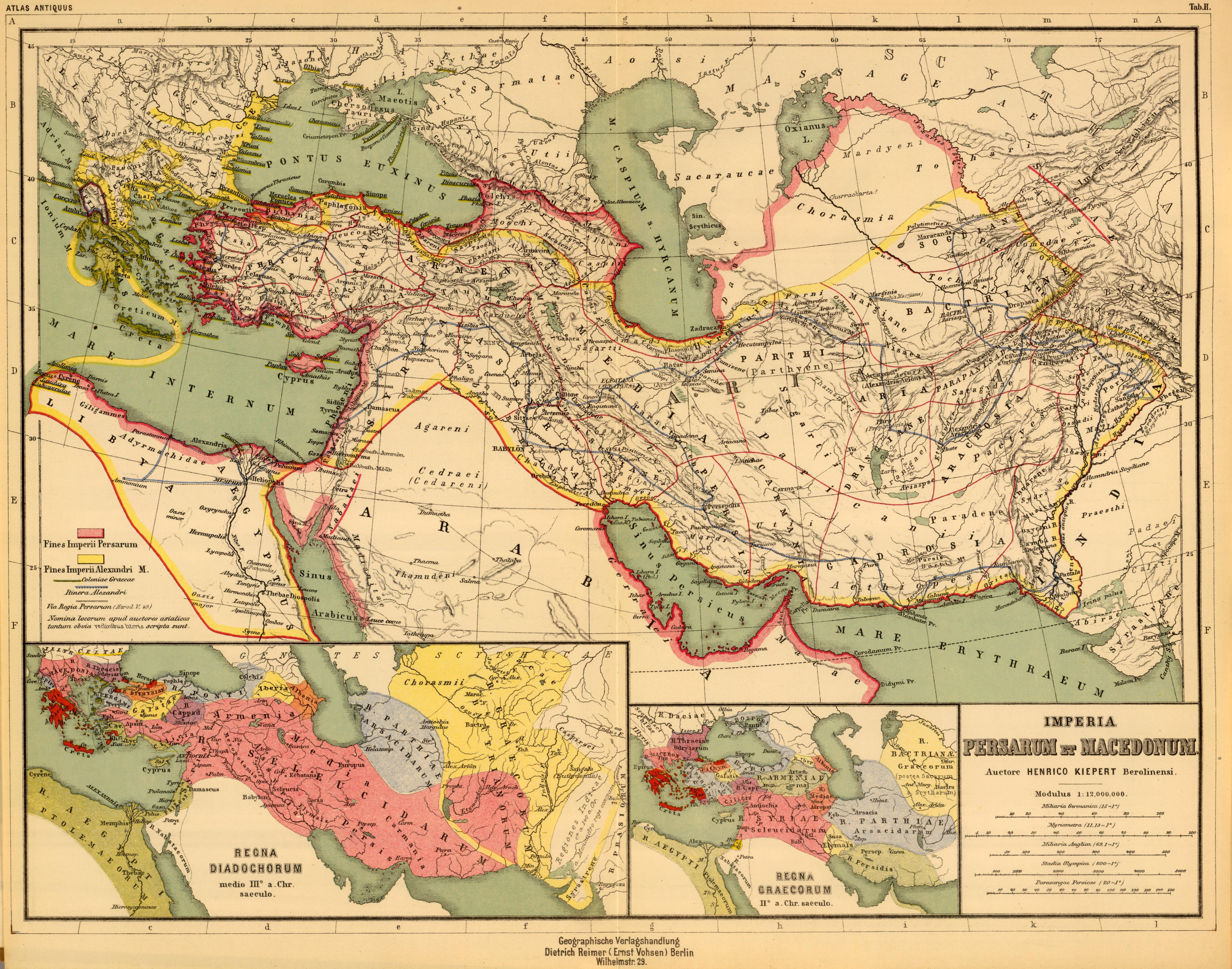 Imperia Persarum et Macedonum. (with) Regna Diadochorum medio IIIo. a. Chr. saeculo. (with) Regna Graecorum IIo a. Chr. saeculo. Auctore Henrico Kiepert Berolinensi. Geographische Verlagshandlung Dietrich Reimer (Ernst Vohsen) Berlin, Wilhemlstr. 29. (1903)